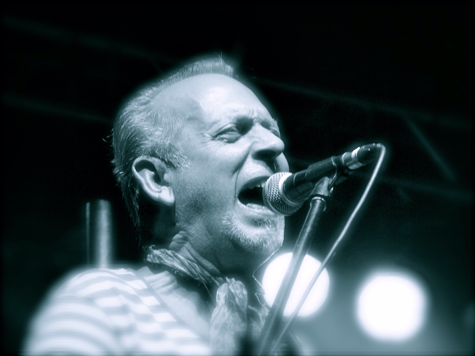 Trevor Burton